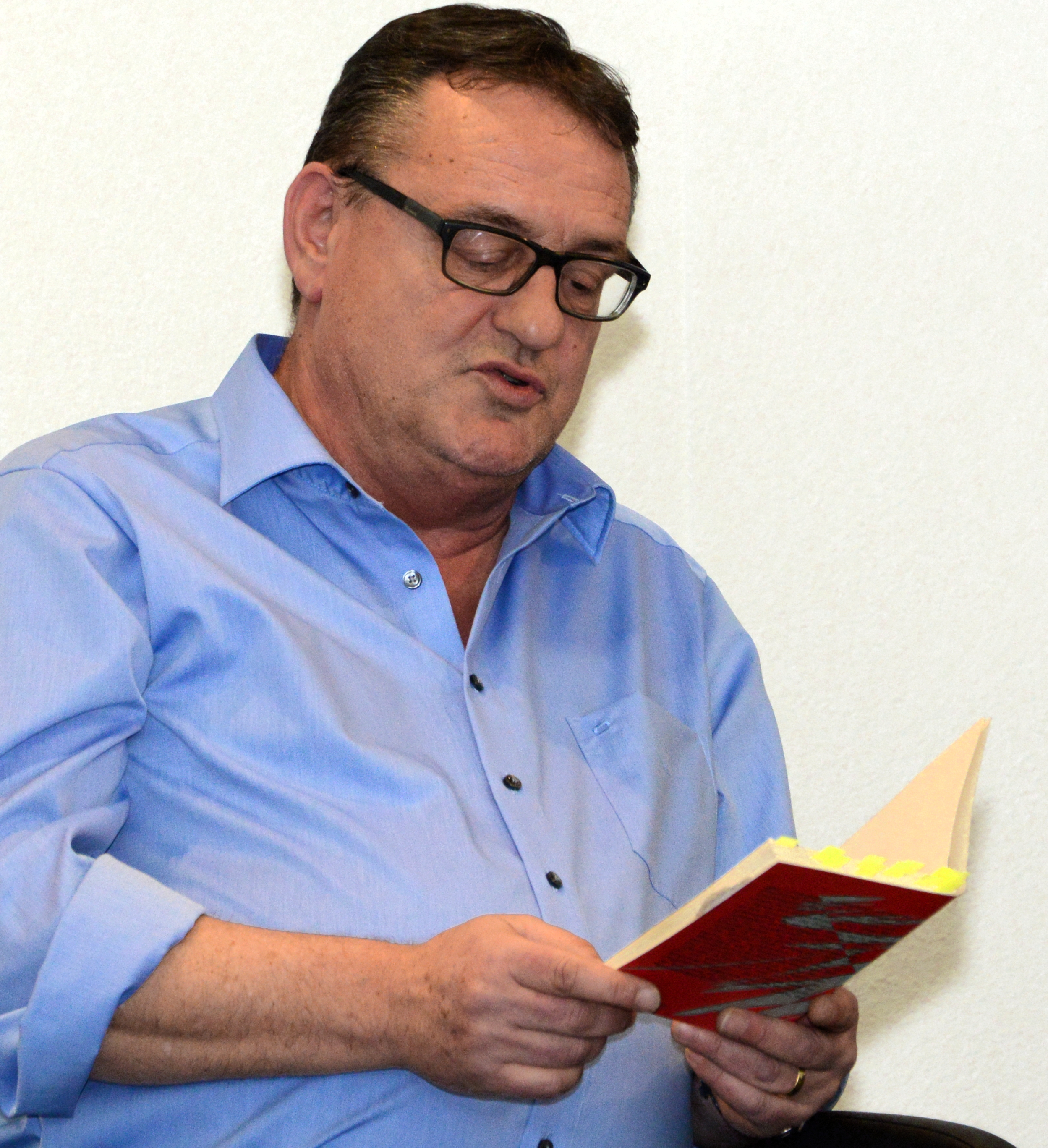 De 27. Januar 2015 huet de Mardi du livre am Kinneksbond zu Mamer un d'Liberatioun vum KZ Auschwitz duerch d'Rout Arméi erënnert. Op Invitatioun vum Fernand Weides huet de Jay Schiltz, Sekretär vun den Témoins de la 2ème génération, aus sengem Buch Aschengänger - Erzählung einer langen Reise virgelies. Den Owend gouf vum Laurent Payfert musikalesch encadréiert. De Jay Schiltz.